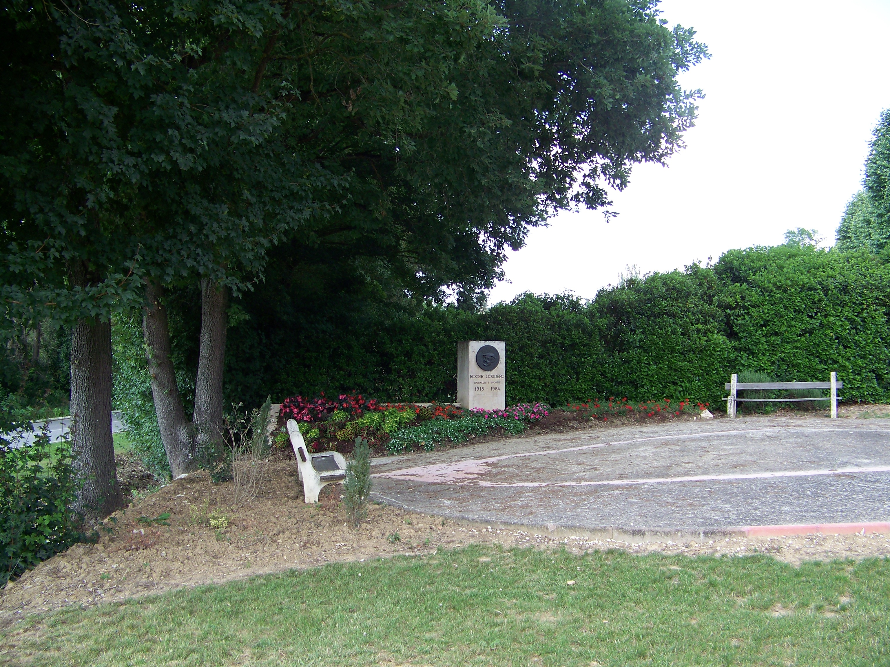 Stèle dédiée à Roger Couderc, Mauvezin (Gers), au carrefour de la route d'Auch et de la route de Fleurance